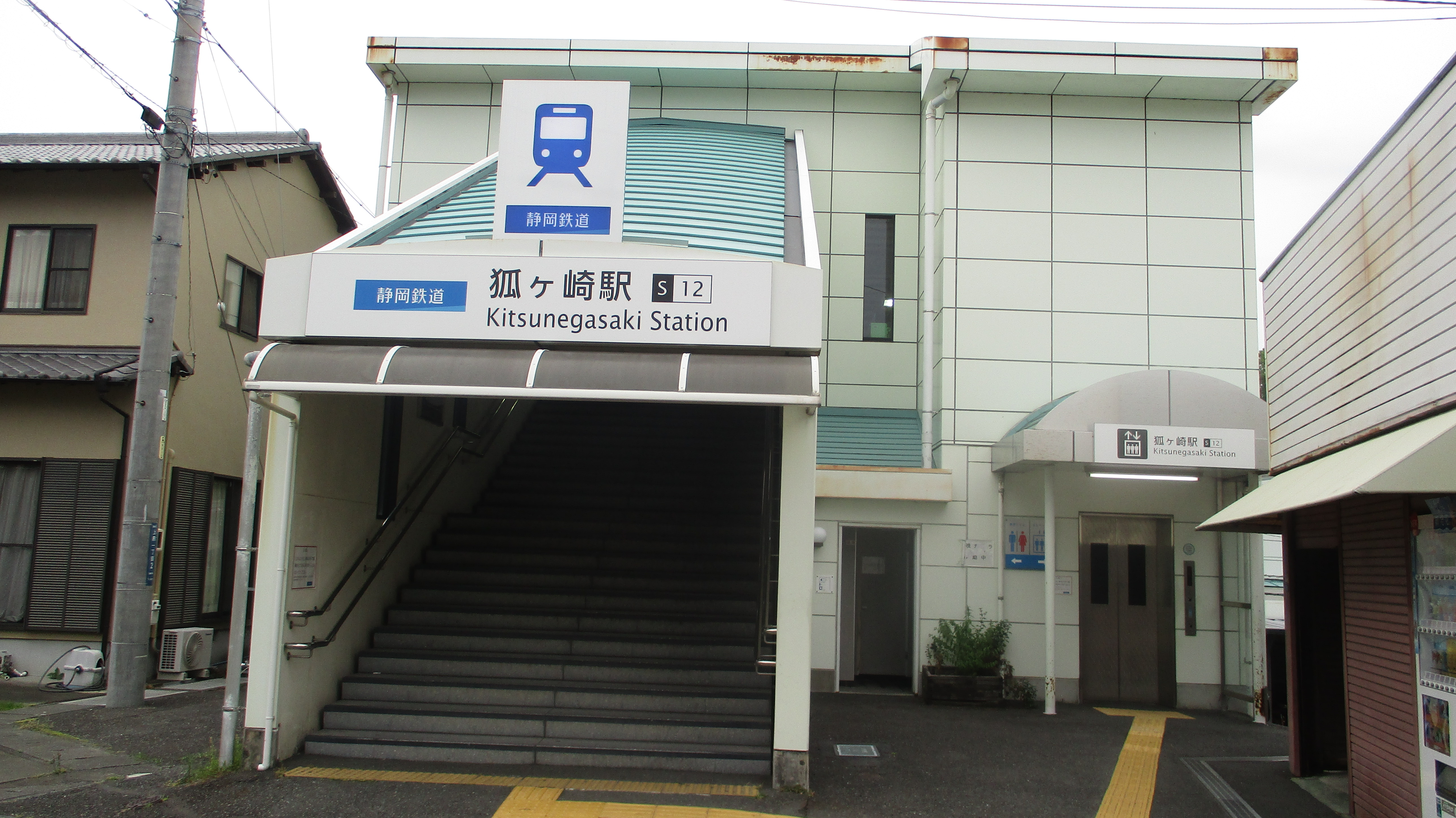 狐ヶ崎駅の駅舎